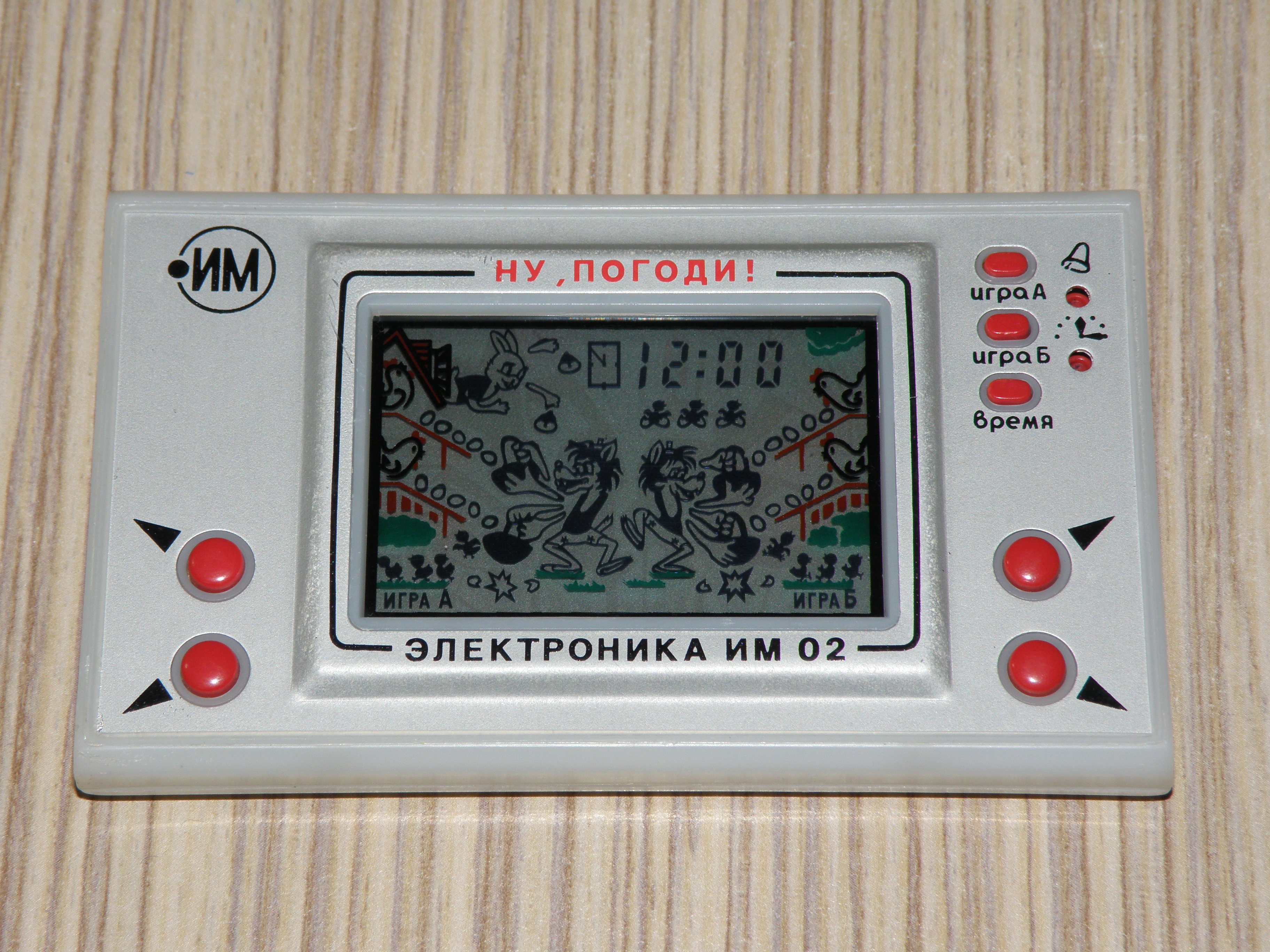 Легендарная электронная игра Ну, Погоди! ИМ-02